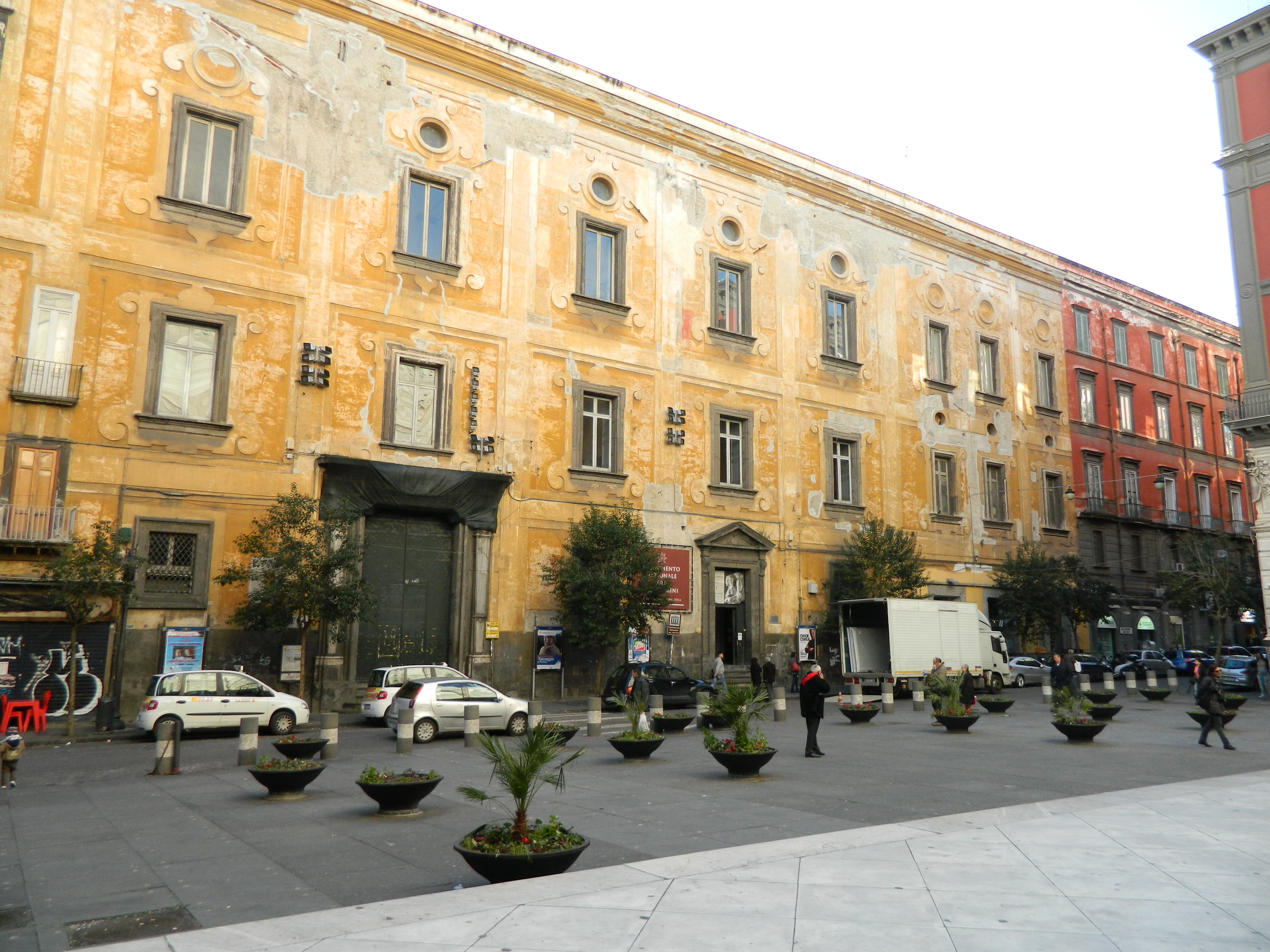 Facciata della quadreria dei Girolamini (Napoli)